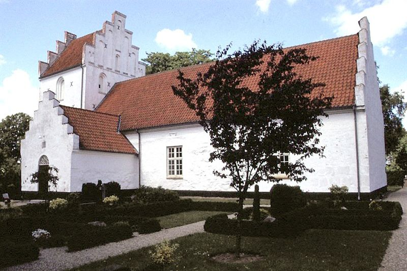 Herringe Kirke i Danmark. Herringe kirke